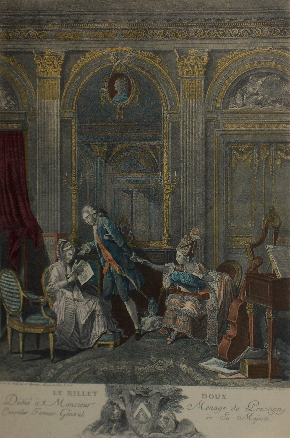 "Le billet doux" (the love letter), (dédié à monsieur Menage de Pressigny, conseiller fermier général de sa Majesté) (18ième siècle)